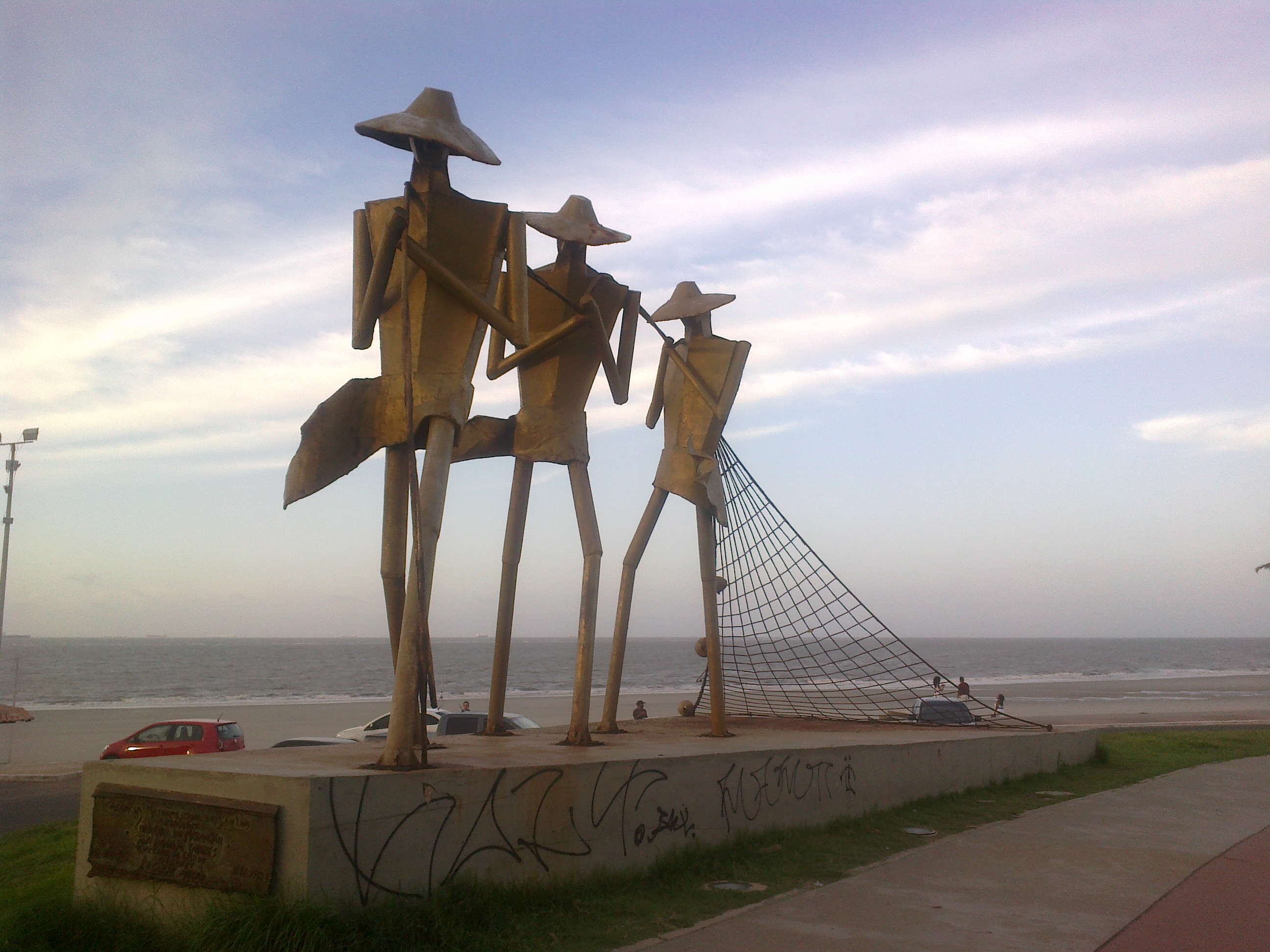 Os Pescadores - São Luís do Maranhão